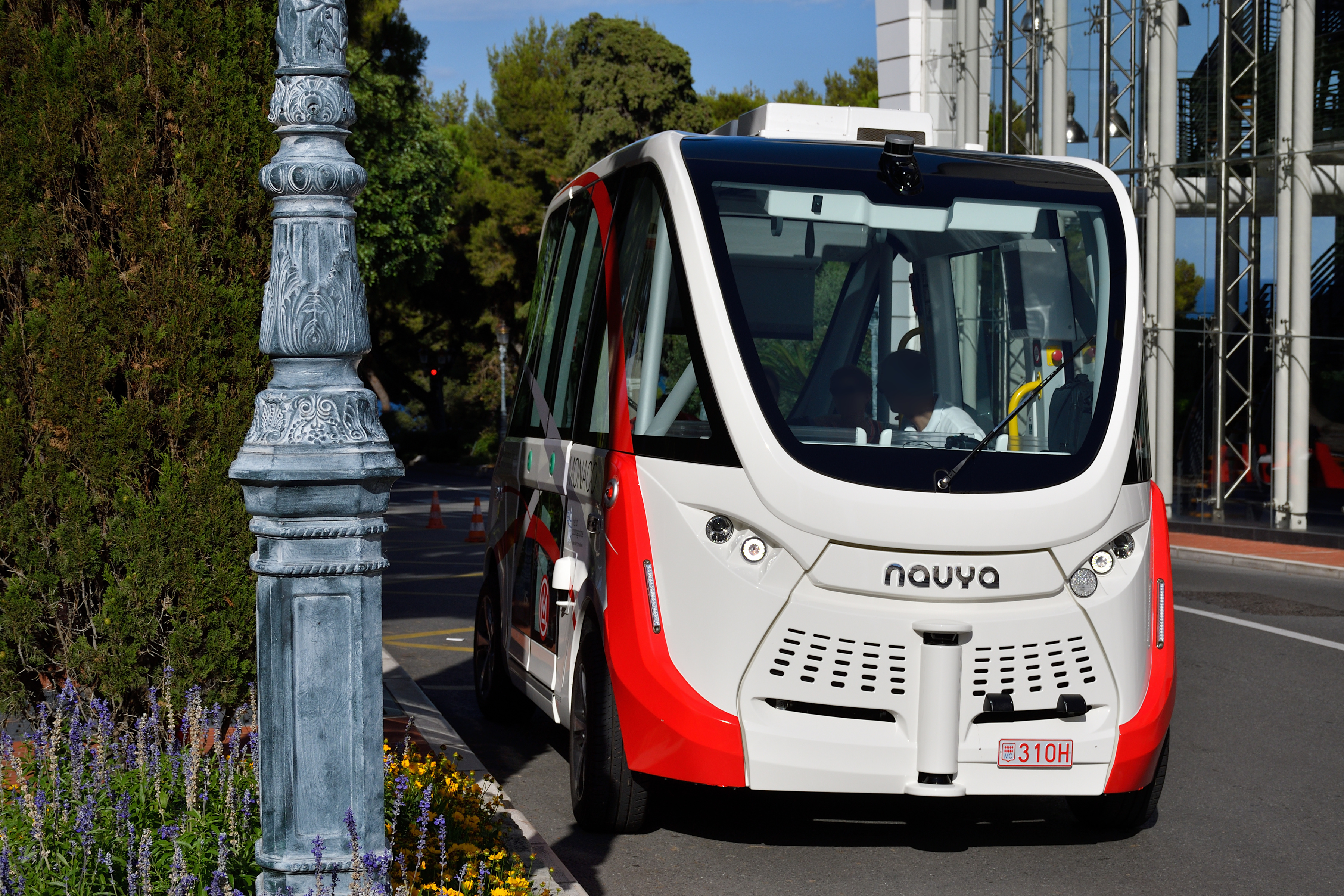 La navette autonome a été mise en service expérimentalement pendant l'été 2019 sur le Rocher, à Monaco.